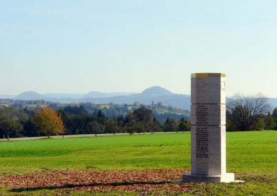 Stauferstele vor dem Eingangstor zum ehemaligen Prämonstratenserkloster Adelberg - im Hintergrund (links neben der Stele) der Bergkegel des Hohenstaufen